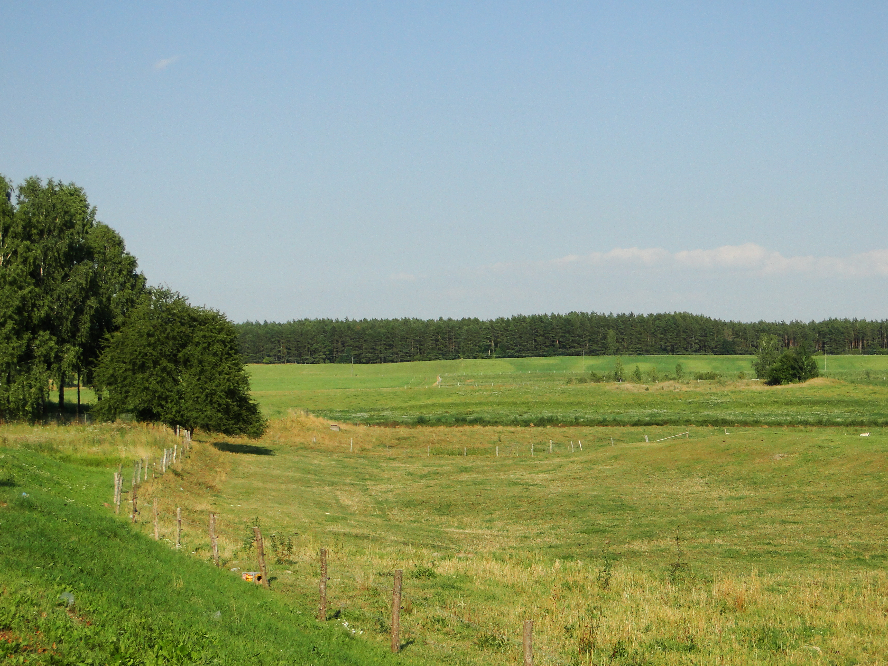 Łąka w Pieckach